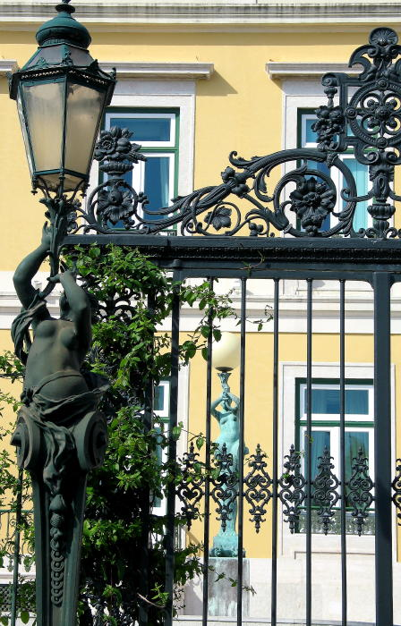 iron gate at Bairro Alto